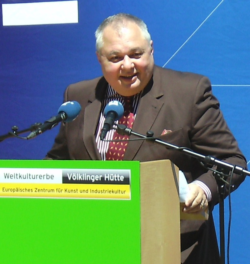 Meinrad Grewenig